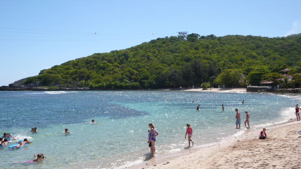 Vue de la plage de Labadee, près du Cap-Haïtien (Haïti).